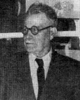 František Vildomec (1878-1975), Český archeolog.